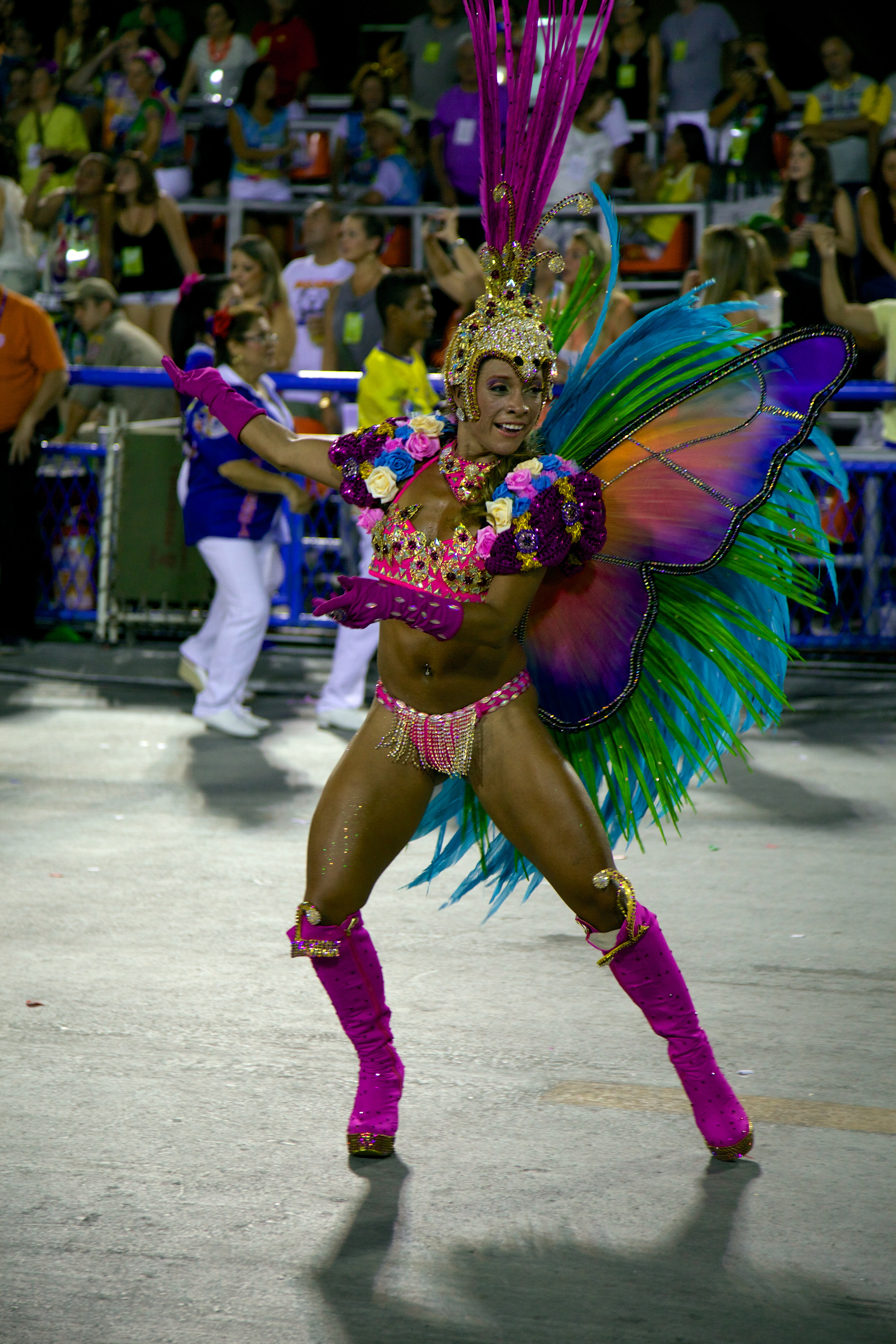 Carnaval 2014 no Sambadrome Marquês de Sapucaí no Rio de Janeiro, Brasil.